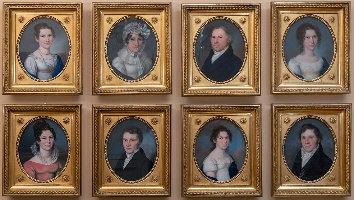 Acht Portäts der Familie Knoblauch und Keibel, 1816-1821, Stadtmuseum Berlin.